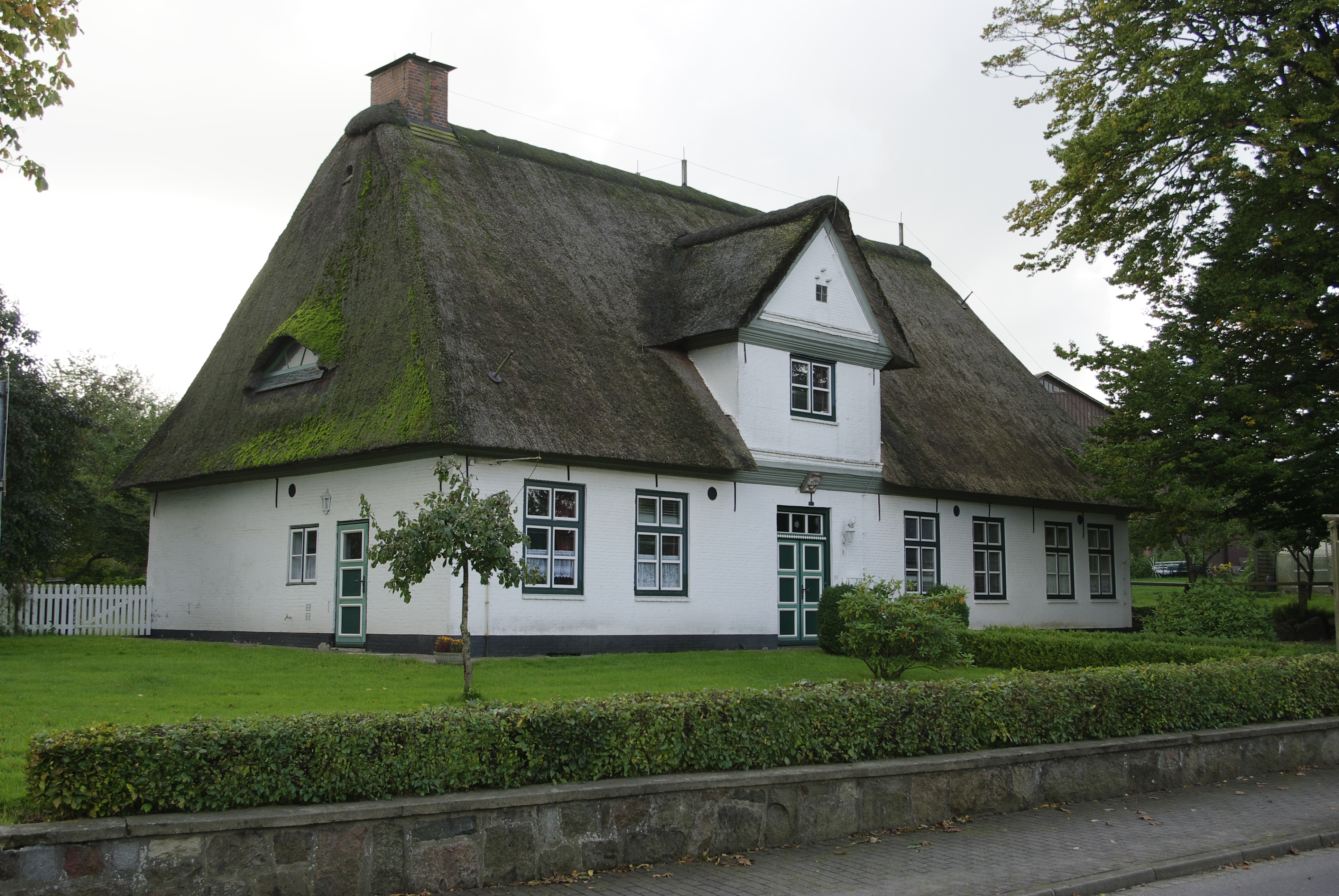 Kulturdenkmale in Bergenhusen Nummer 2